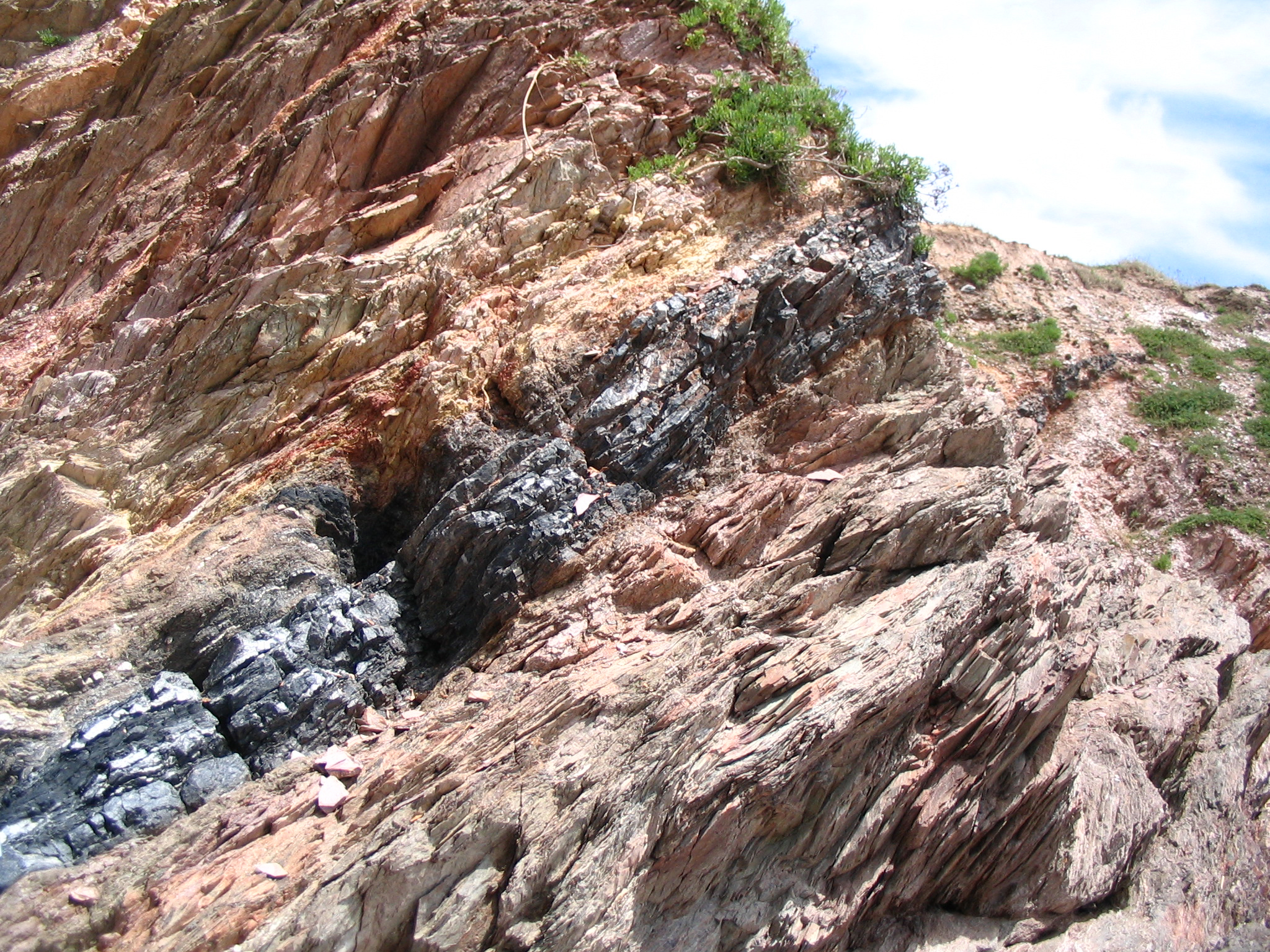 Estran de Brétignolles, Vendée, F. Banc d'ampélite